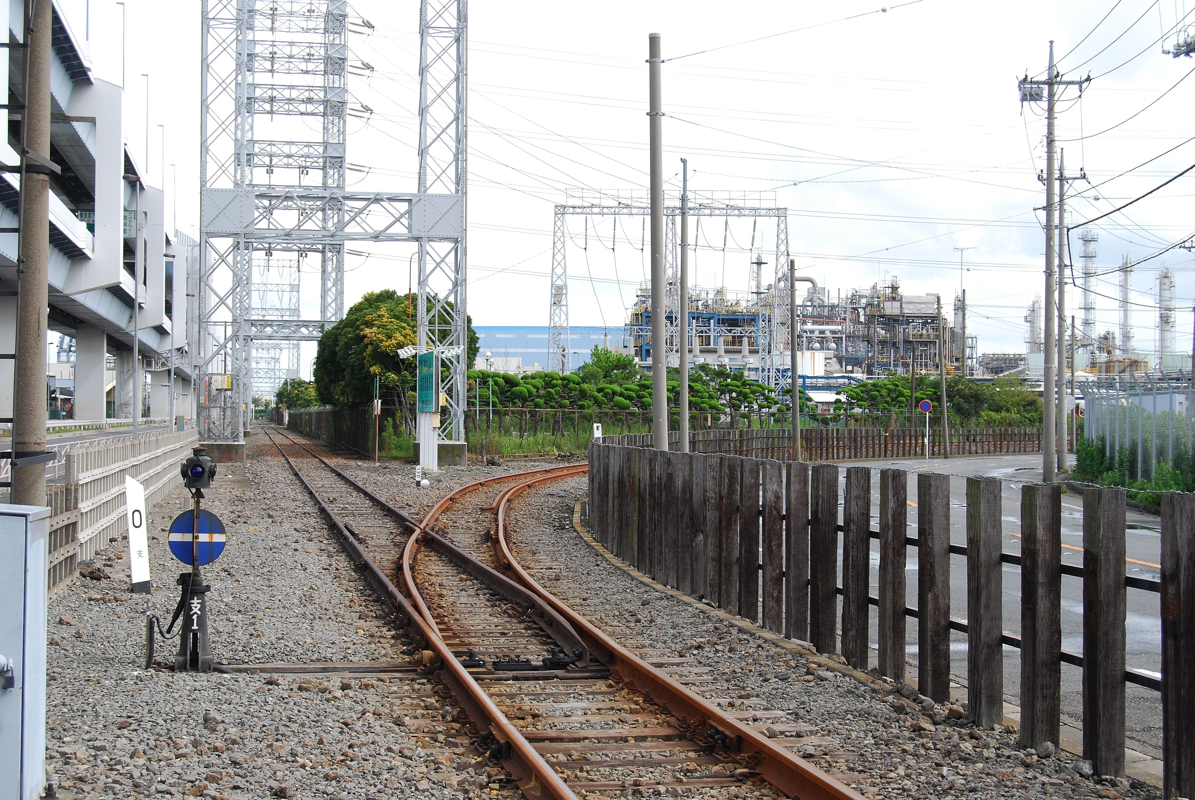 川崎臨海鉄道浮島線、浮島町駅構内。右に曲がる路線は東燃ゼネラル石油川崎工場の専用線。（踏切から撮影）